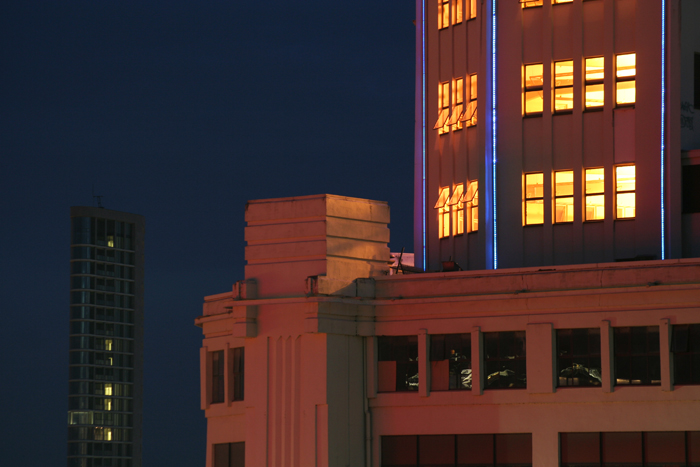 Vestedatoren & Lichttoren.